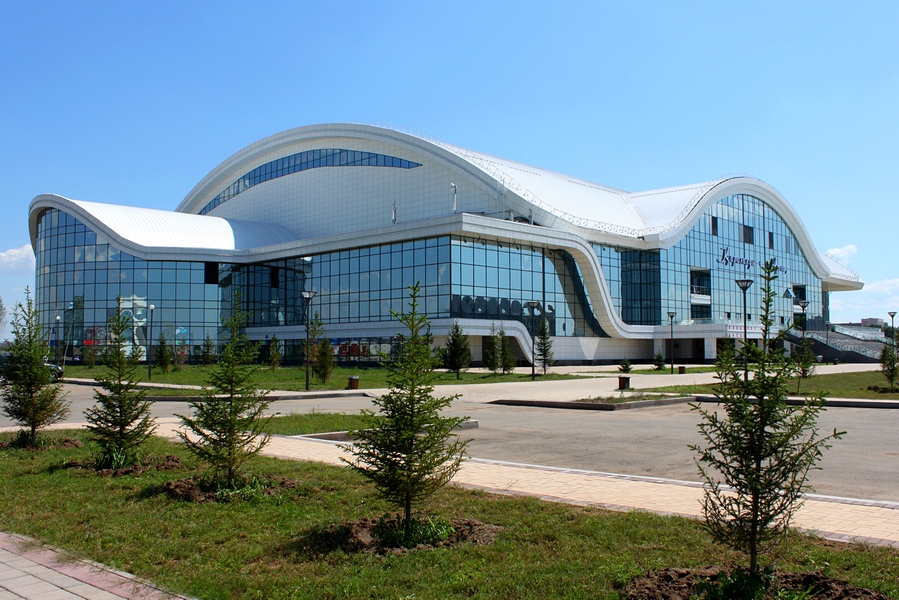 Ледовый дворец